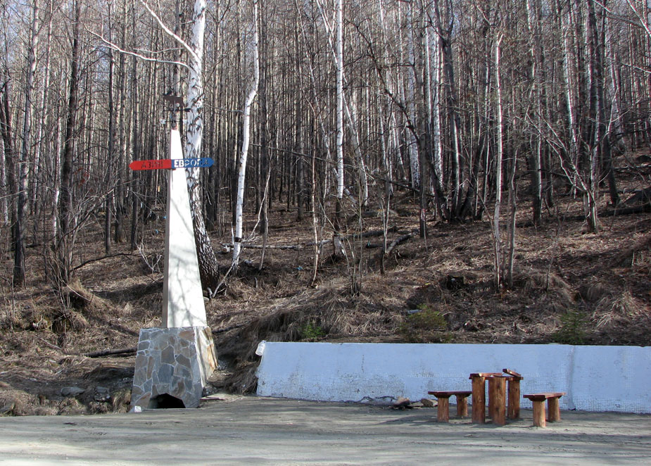 Обелиск Азия-Европа, рядом с посёлком Большие Егутсы